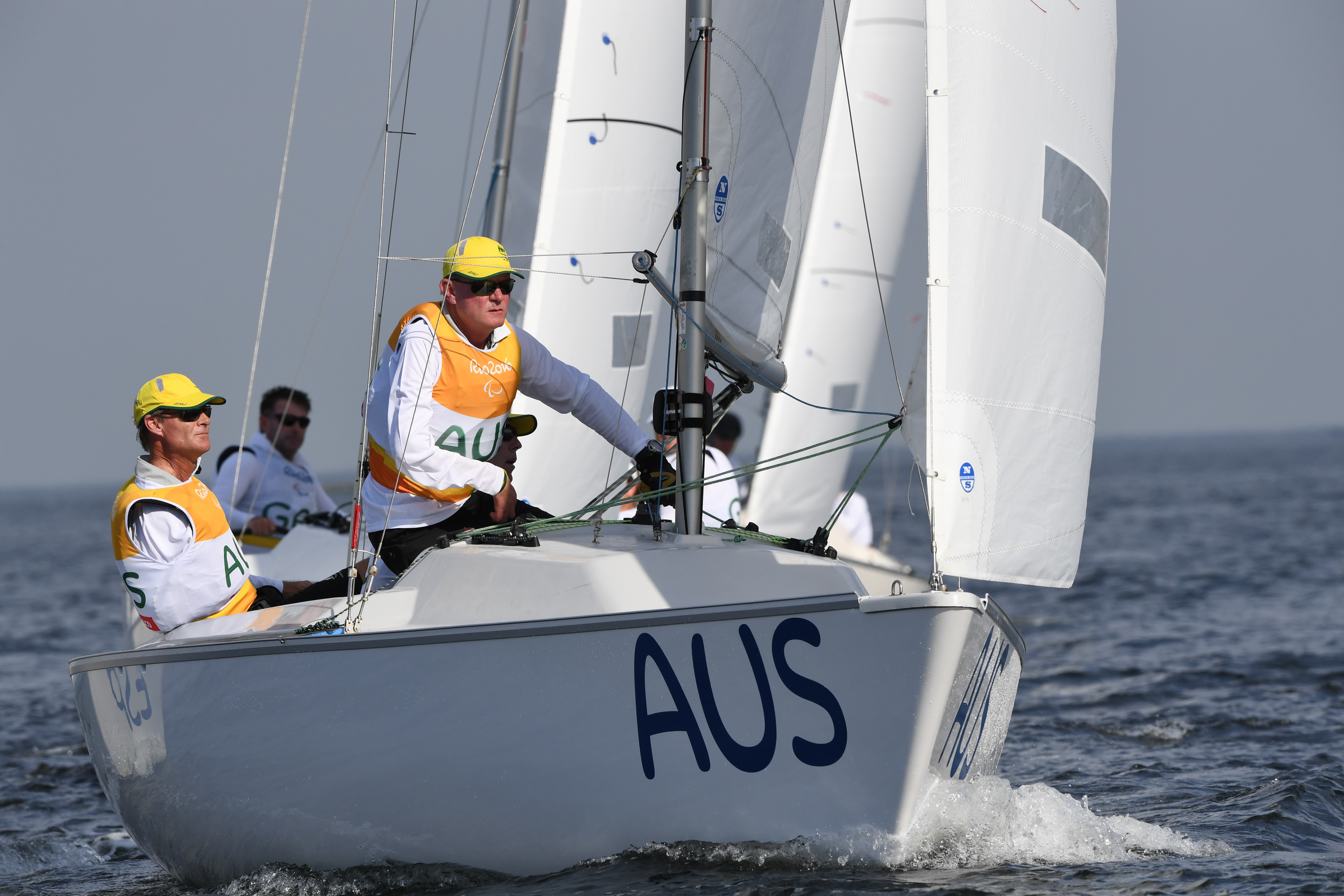 Rio de Janeiro - Prova classificatória de barco de quilha fixa 3 pessoas (Sonar) em oitavo lugar na Paralimpíada Rio 2016 (Tomaz Silva/Agência Brasil)